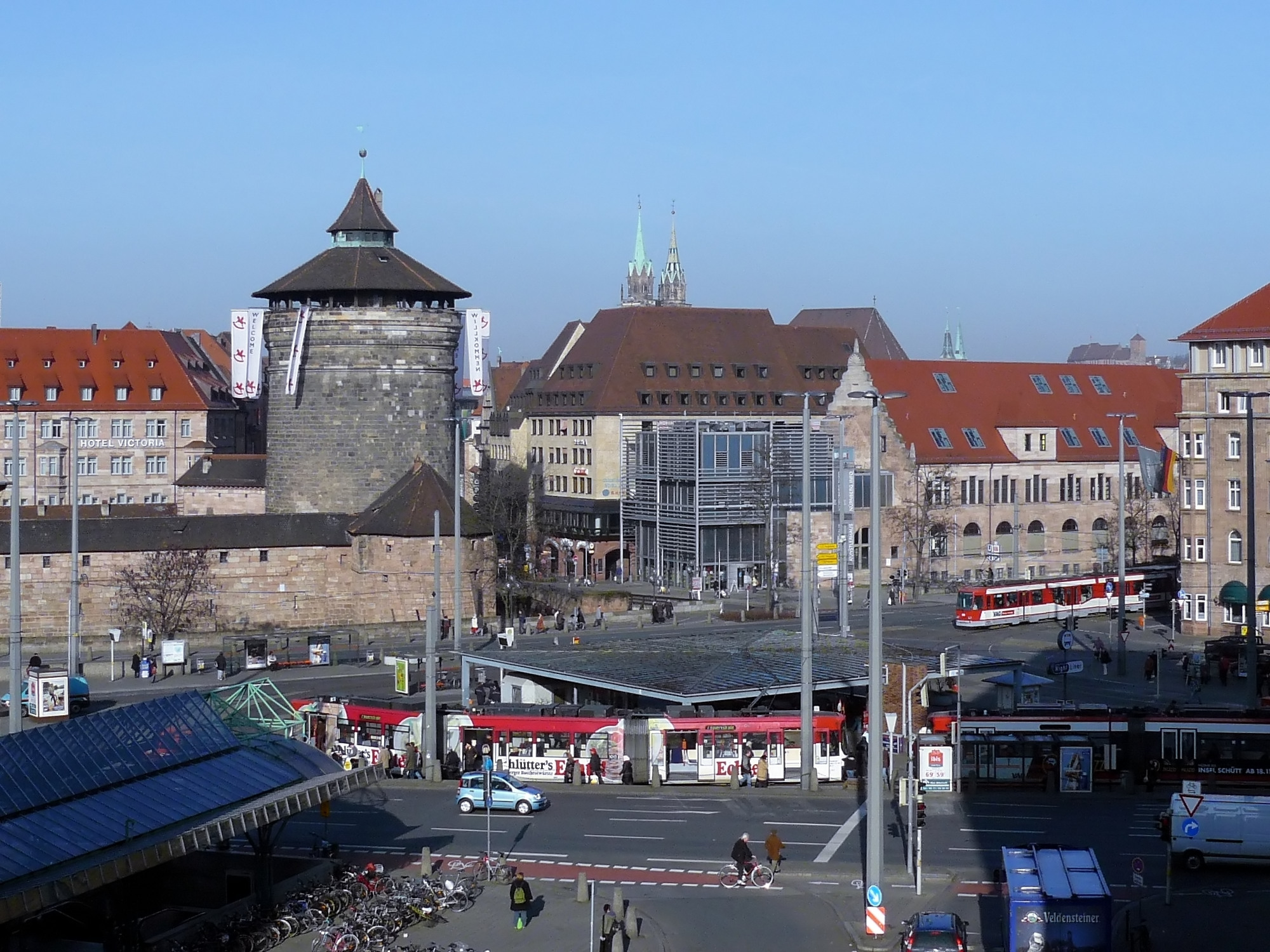 Auf dem Bahnhofplatz in Nürnberg warten Züge der Linie 5 und 7 abfahrbereit in der Wendeschleife, von links oben kommt ein Wagen der Linie 8 aus Erlenstegen.